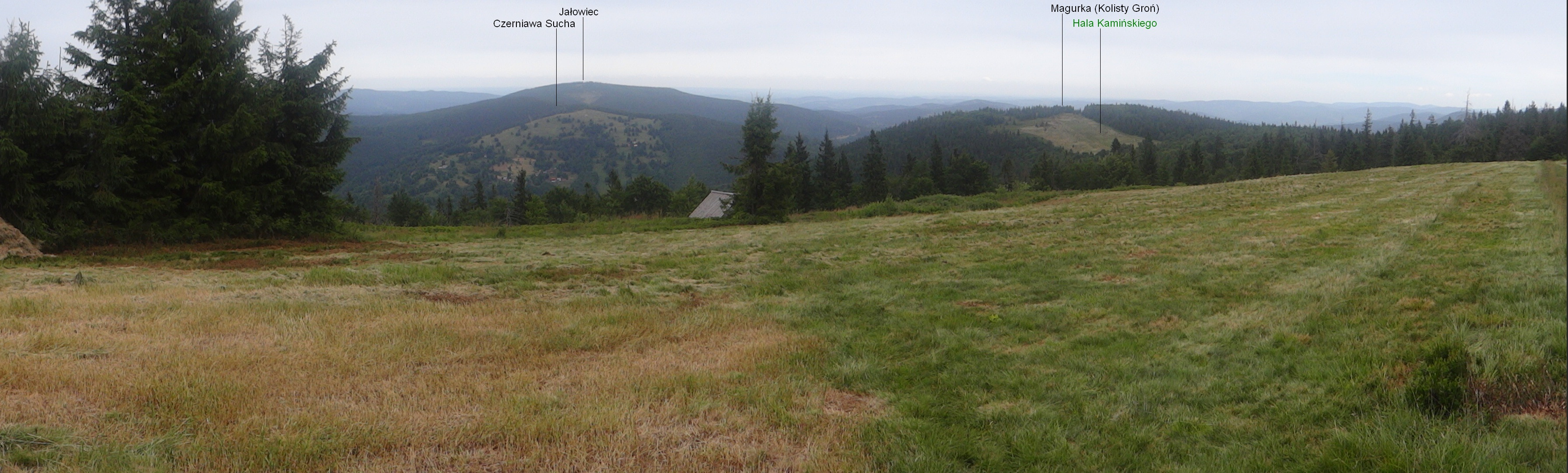 Hala Mędralowa i panorama widokowa